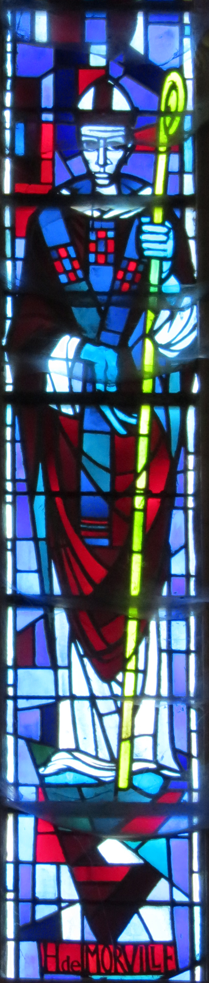 Hugues de Morville, évêque de Coutances (1208-1238), principal restaurateur de la cathédrale.